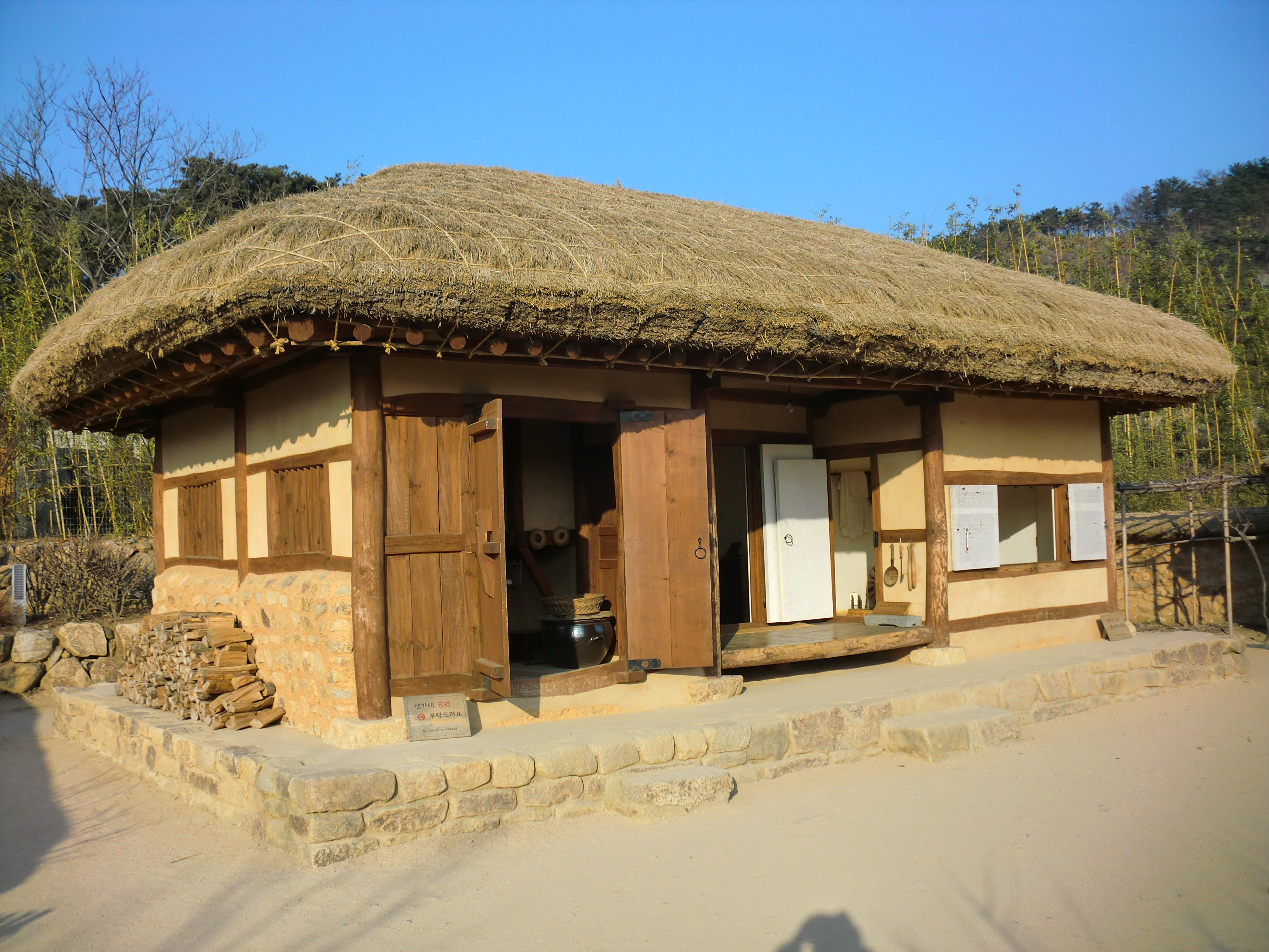 노무현 대통령 생가(복원)